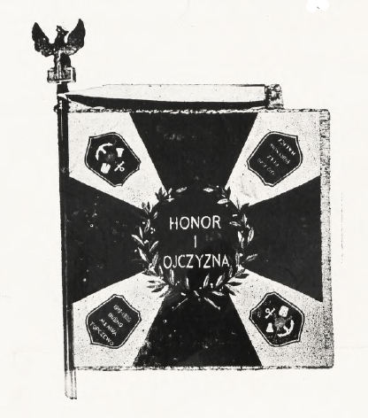 prawa strona sztandaru 1 pułku saperów